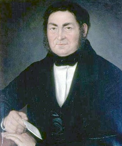 Johann Balthasar von Schmidsfeld 10.02.1777 - 25.10.1846